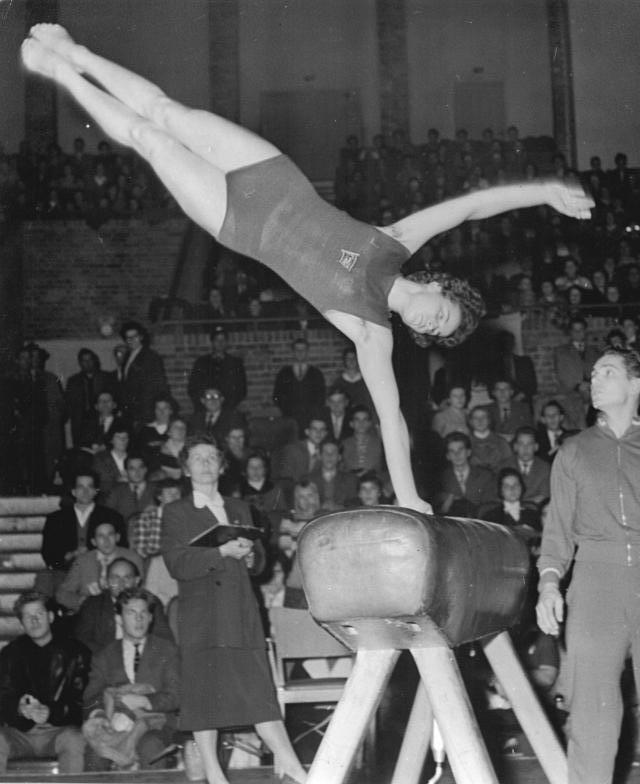 Ute Stark Zentralbild Zastrow 17.11.1958 Jubiläumsturnen in der Deutschen Sporthalle Am 9.11.1958 fand in der Deutschen Sporthalle Berlin, Stalinallee das 10. Berliner Kunstturnen statt, an dem 45 Turnerinnen und 68 Turner teilnahmen. UBz: Ute Stark (Lok Leipzig) bei ihrer Kür am Pferd.